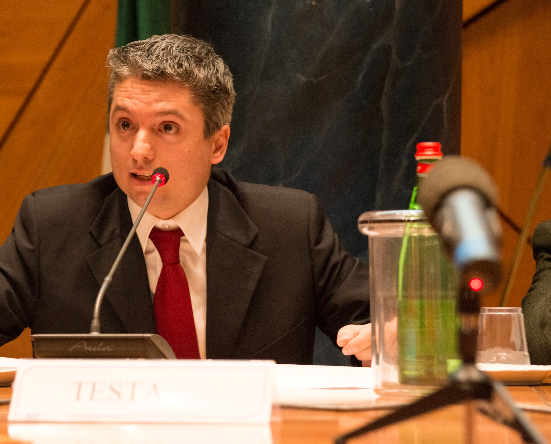 Pierluigi Testa, Presidente del Think Tank Trinita' dei Monti, all'interno della "Sala delle Colonne" nella Camera dei Deputati